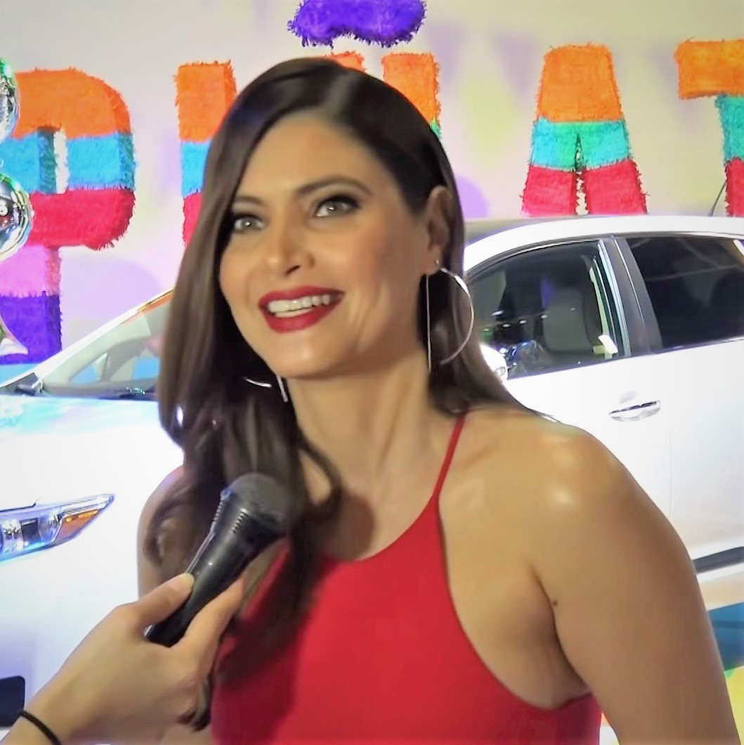 Chiquinquirá Delgado nos habla sobre su matrimonio con Jorge Ramos y si planean tener hijos Copyright Dulce Osuna &